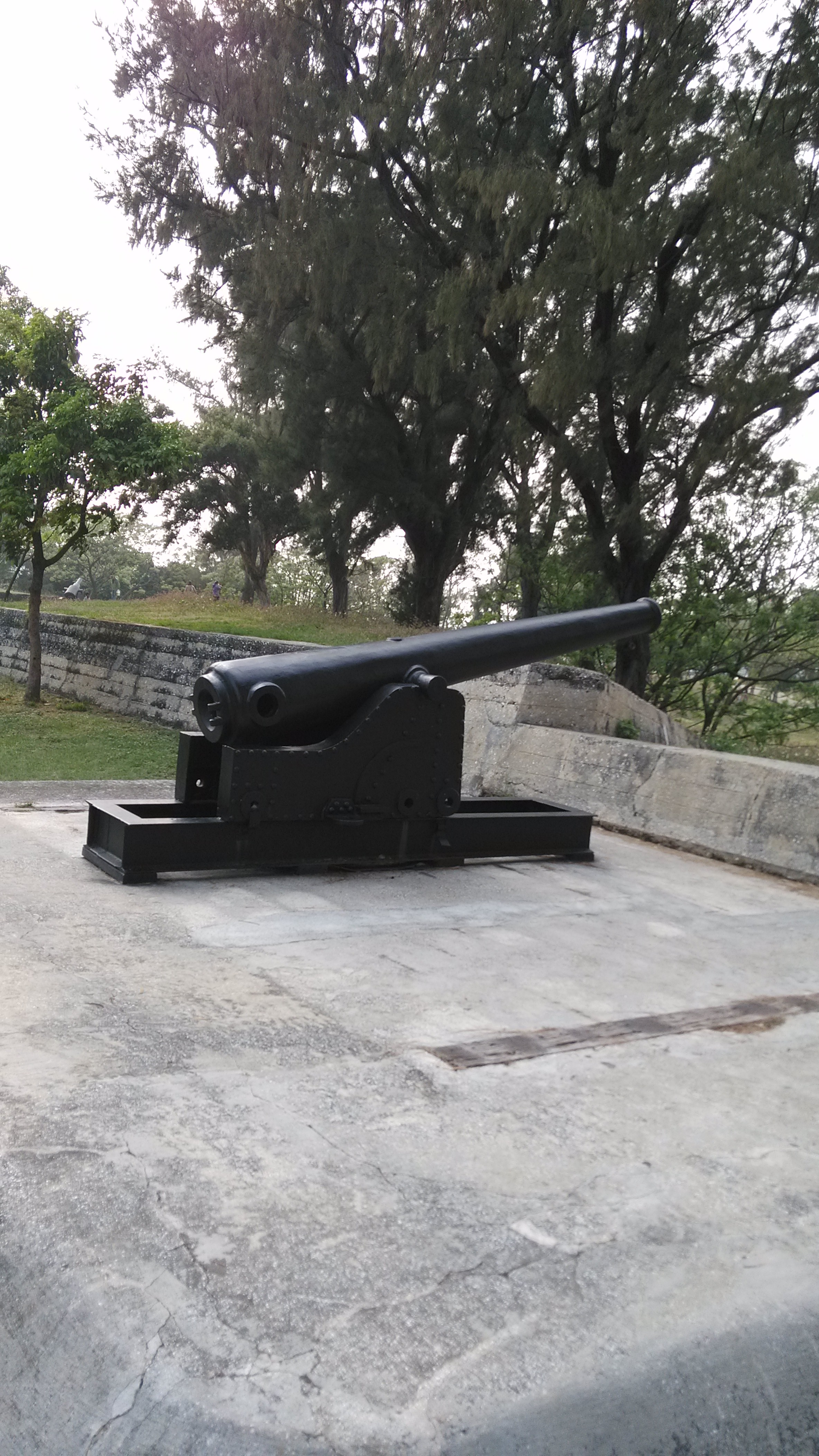 Drehbasse